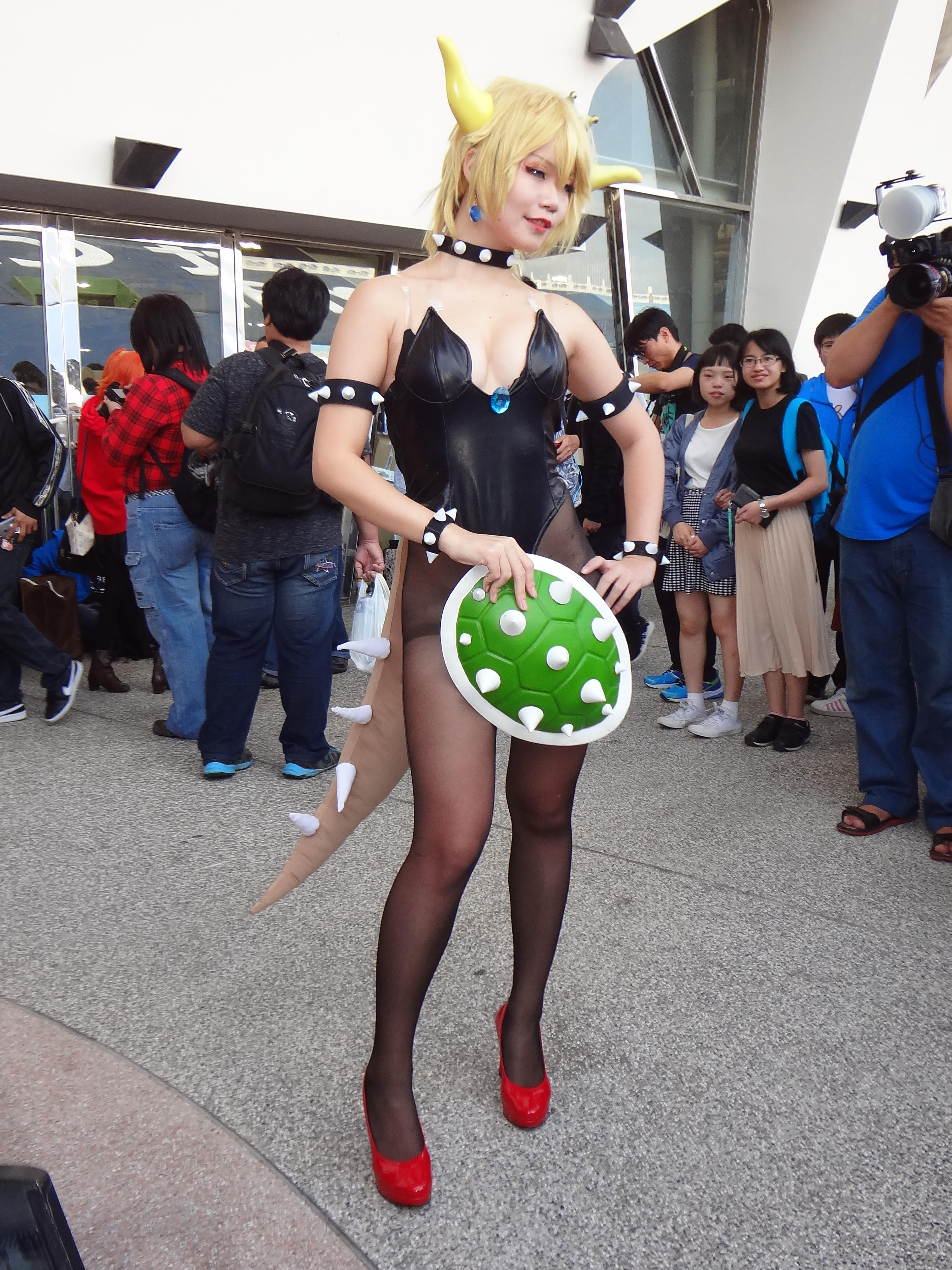 第29屆亞洲動漫創作展，庫巴姬cosplayer。